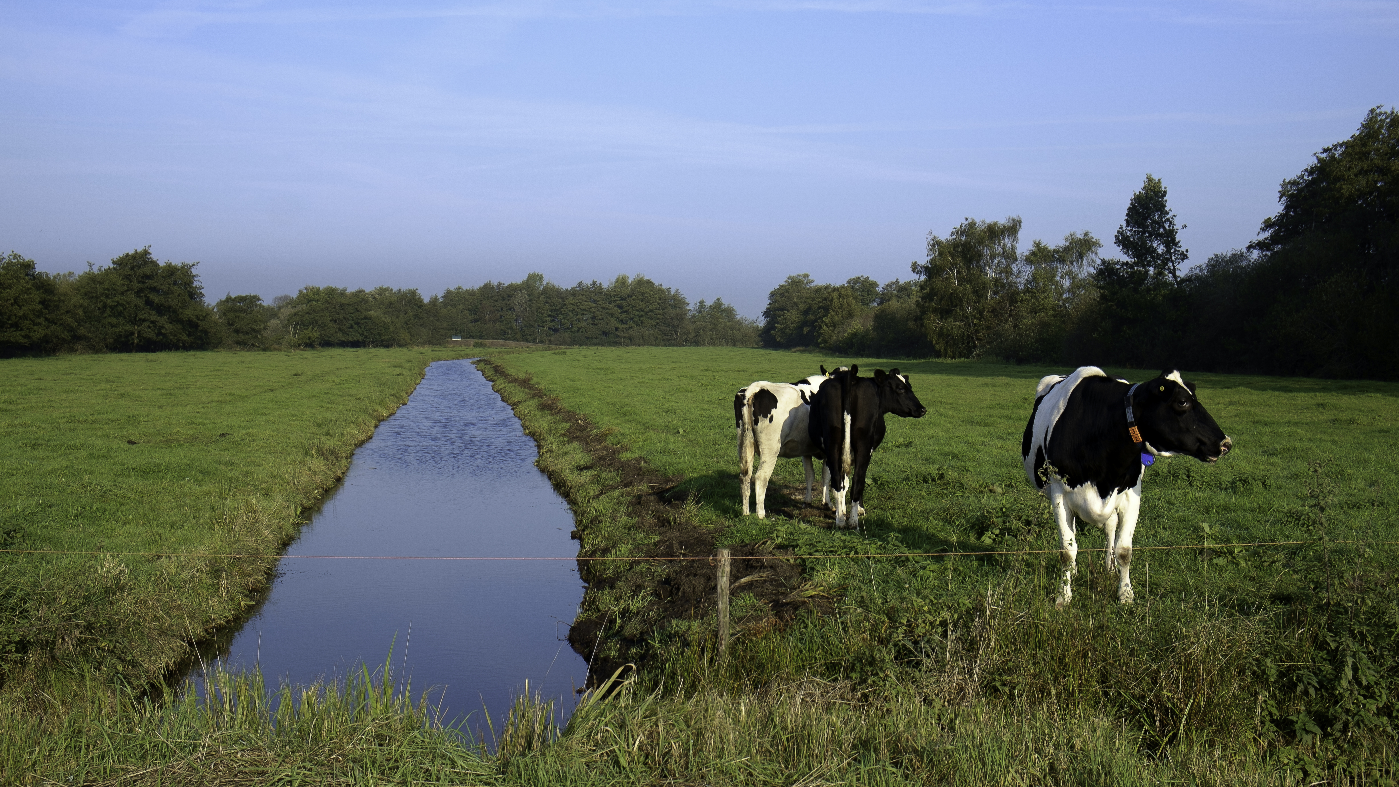 Veenweidegebied in de Oostpolder